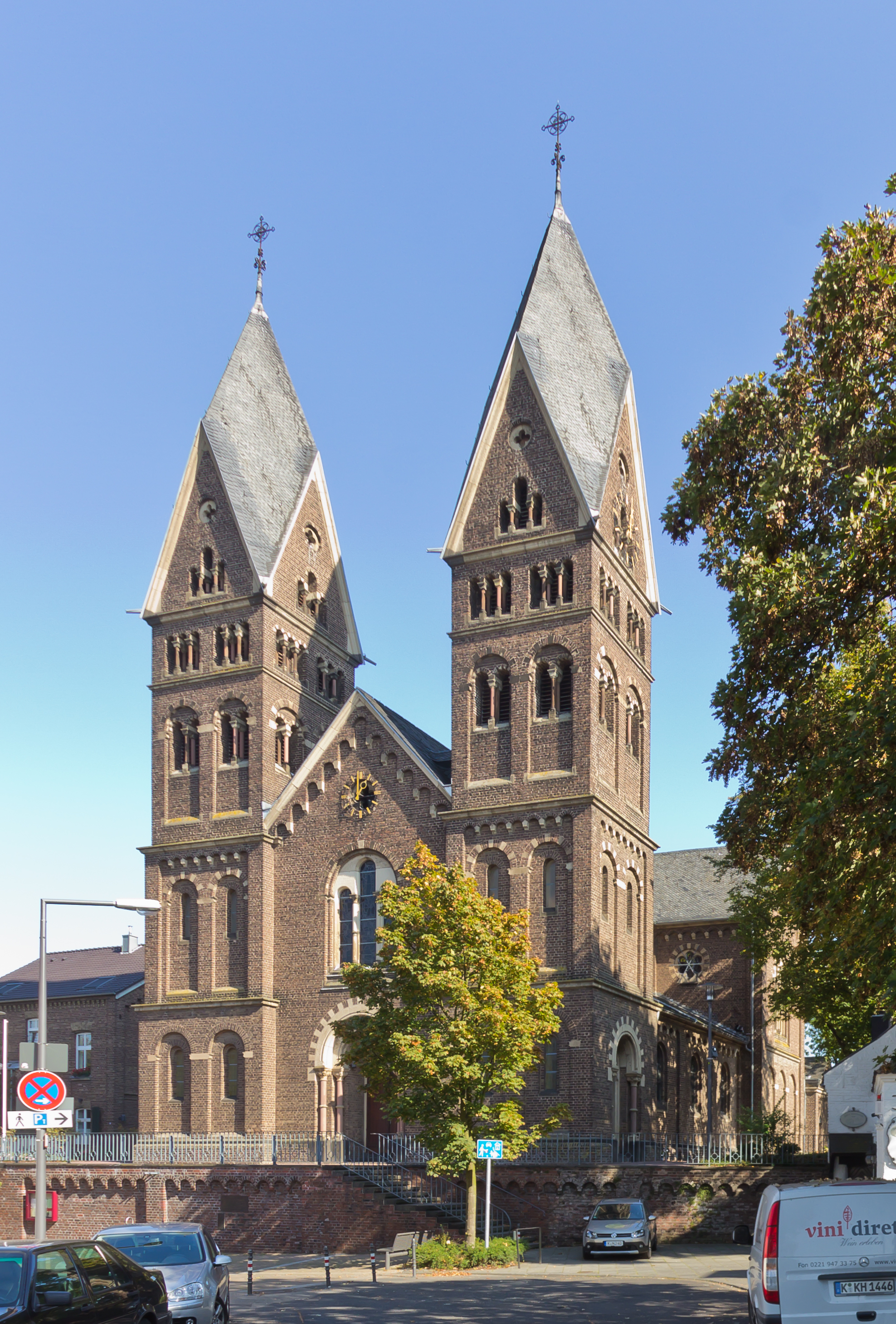 St. Vitalis Köln-Müngersdorf This is a photograph of an architectural monument.